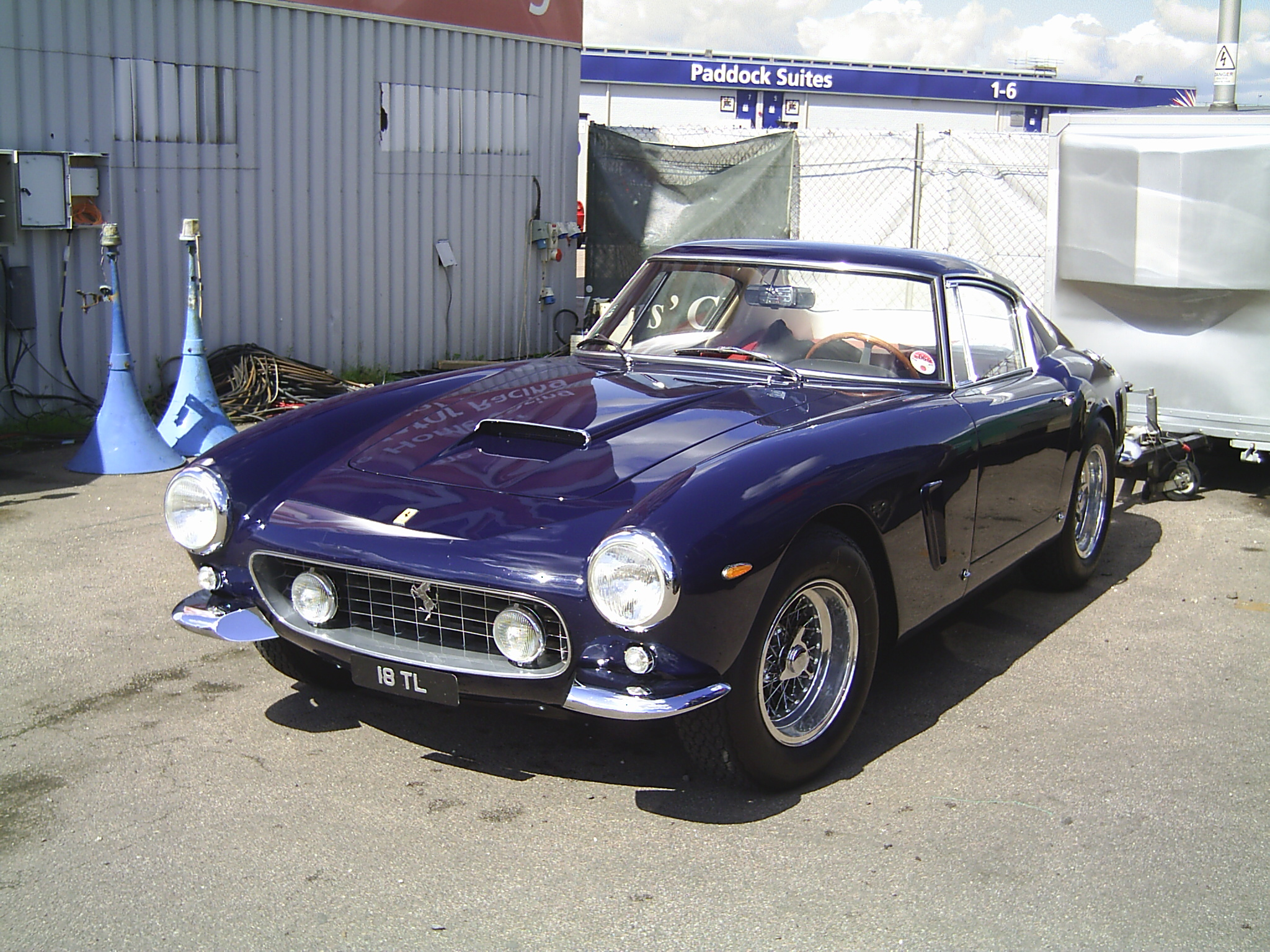 Ferrari_250_GT_Berlinetta_SWB